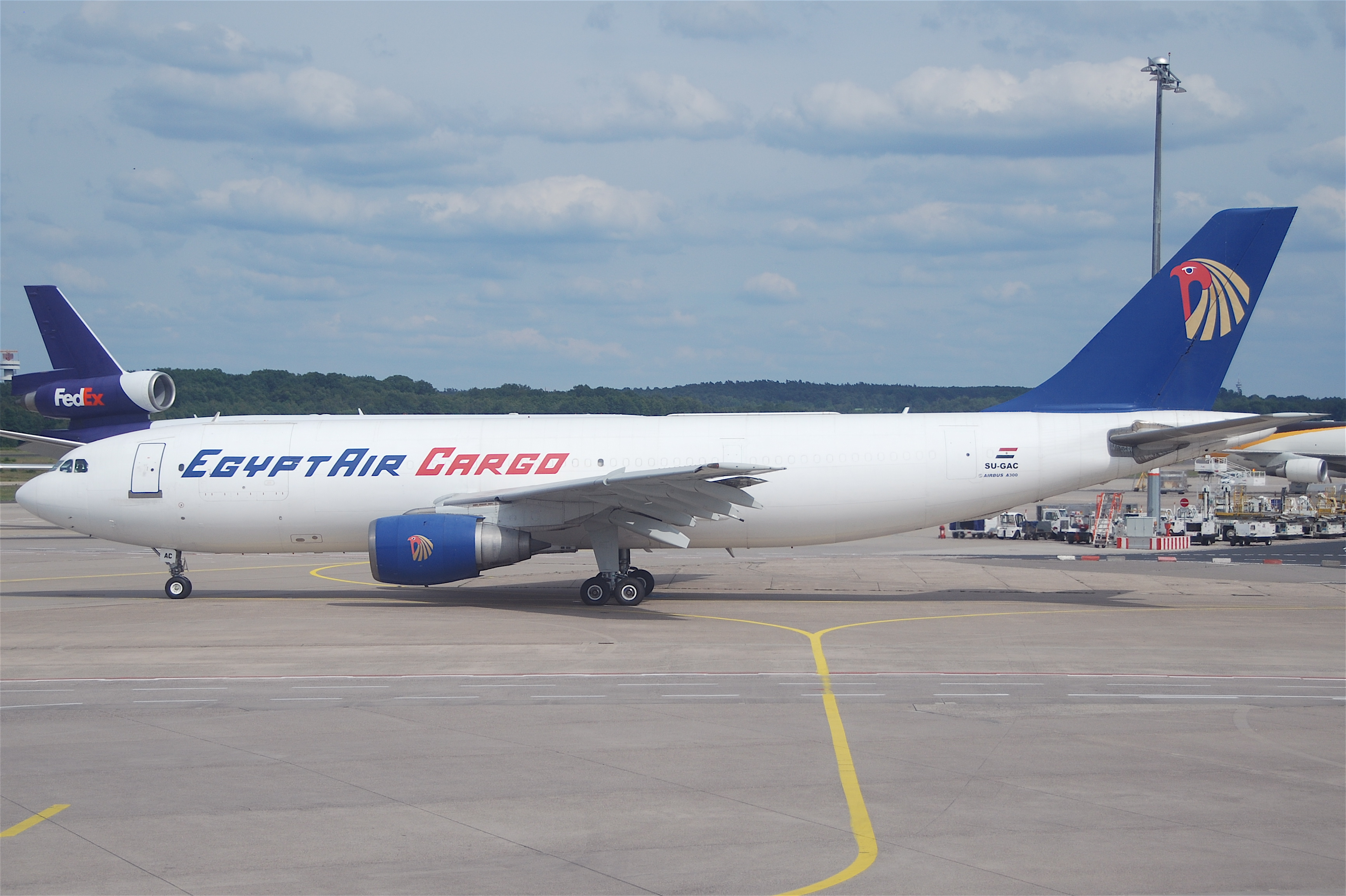 EgyptAir Cargo Airbus A300B4-203F; SU-GAC@CGN;12.06.2011/600da